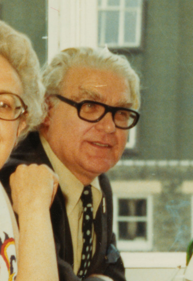 Emrys Jones